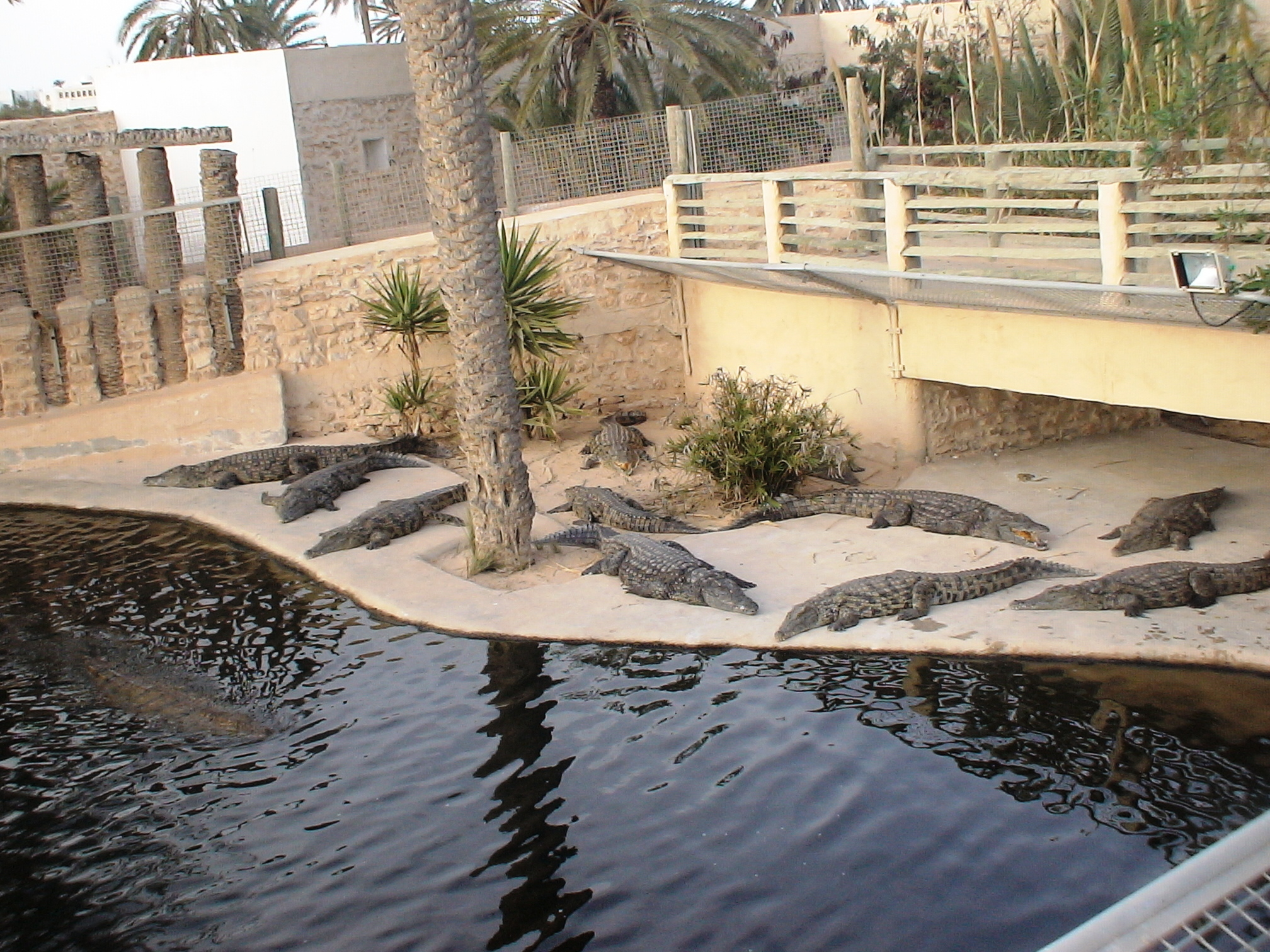 Crocodiles dans un parc à thème à l'ile de Djerba